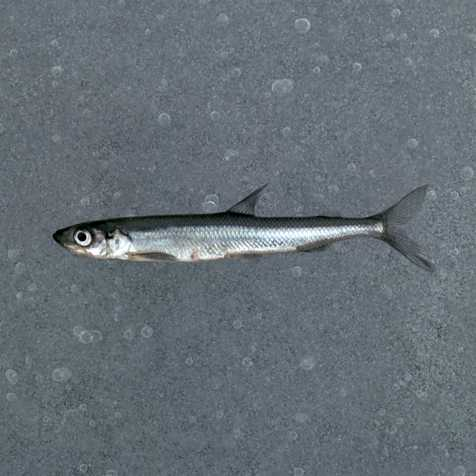 Pez teleósteo, es pariente del salmón, es de unos veinte centímetros de largo aproximadamente, su dorso es verdoso y de vientre blancusco, con una banda plateada en los flancos y la mandíbula ligeramente prominente. Es propio de los mares del norte de Europa y frecuenta las desembocaduras de los ríos, donde freza. Su nombre proviene de la palabra francés éperlan y esta de la palabra alemán spierling. Existen dos tipos de eperlanos: -El de Europa que mide entre 15 a 25 cm. de longitud -El eperlano viridescens, que abunda en los ríos en las cercanías de Boston y en los lagos de América. Este pez se ingiere entero, se come todo, cabeza, espinas, cola y gonadas.